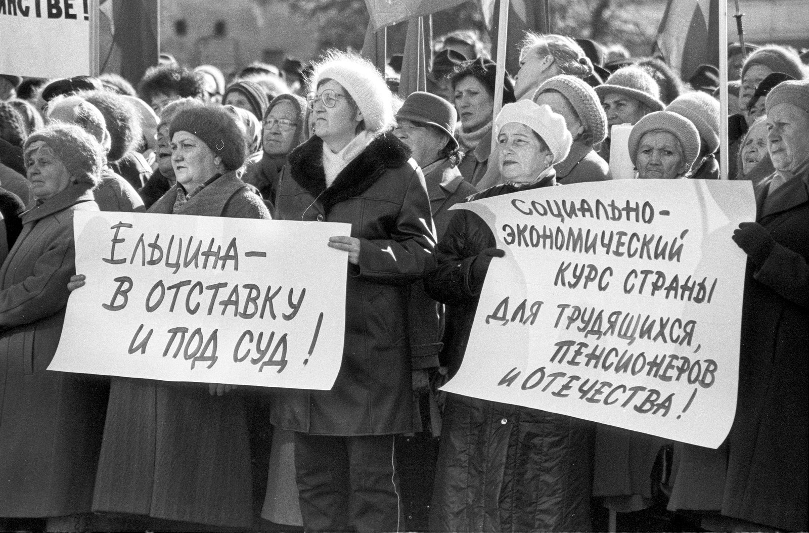 7 октября 1998 года на Народной площади состоялся митинг трудящихся и ветеранов города Переславля и Переславского района в рамках Всероссийской акции протеста профсоюзов «Нет — губительным экономическим реформам». Принята резолюция, которая потребовала отставки президента Бориса Николаевича Ельцина и выразила доверие председателю правительства Евгению Максимовичу Примакову. Лозунги на плакатах: «Ельцина — в отставку и под суд!», «Социально-экономический курс страны для трудящихся, пенсионеров и отечества!»